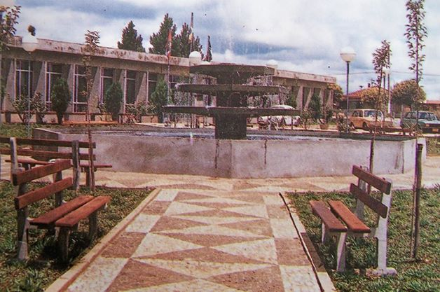 Paço Municipal na década de 80